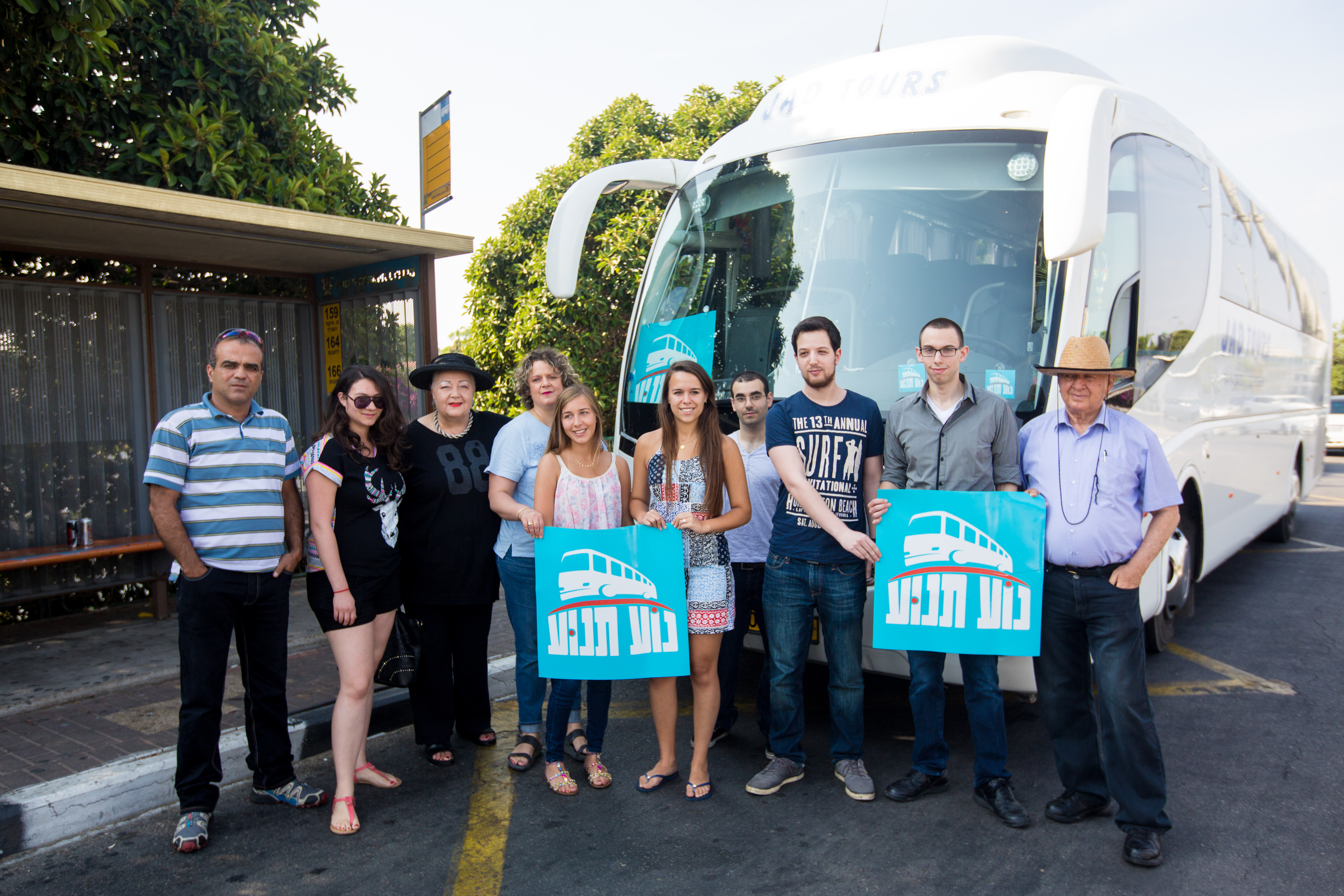 יו"ר ה-12 של הכנסת, דן תיכון, יו"ר נוע תנוע רועי שוורץ-תיכון ומתנדבים נוספים בחנוכת קו 63 של הפרויקט, אלוף שדה, רמת גן